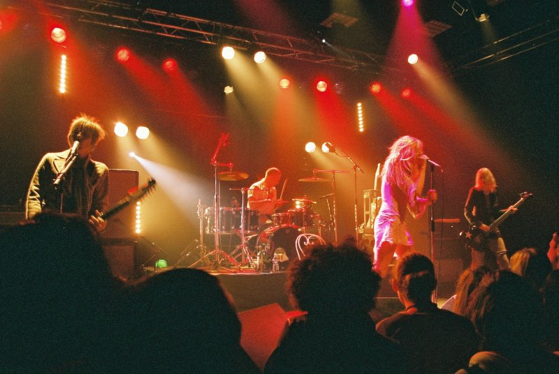 Queen Adreena en concert au Big Band Café, Caen/Hérouville Saint-Clair